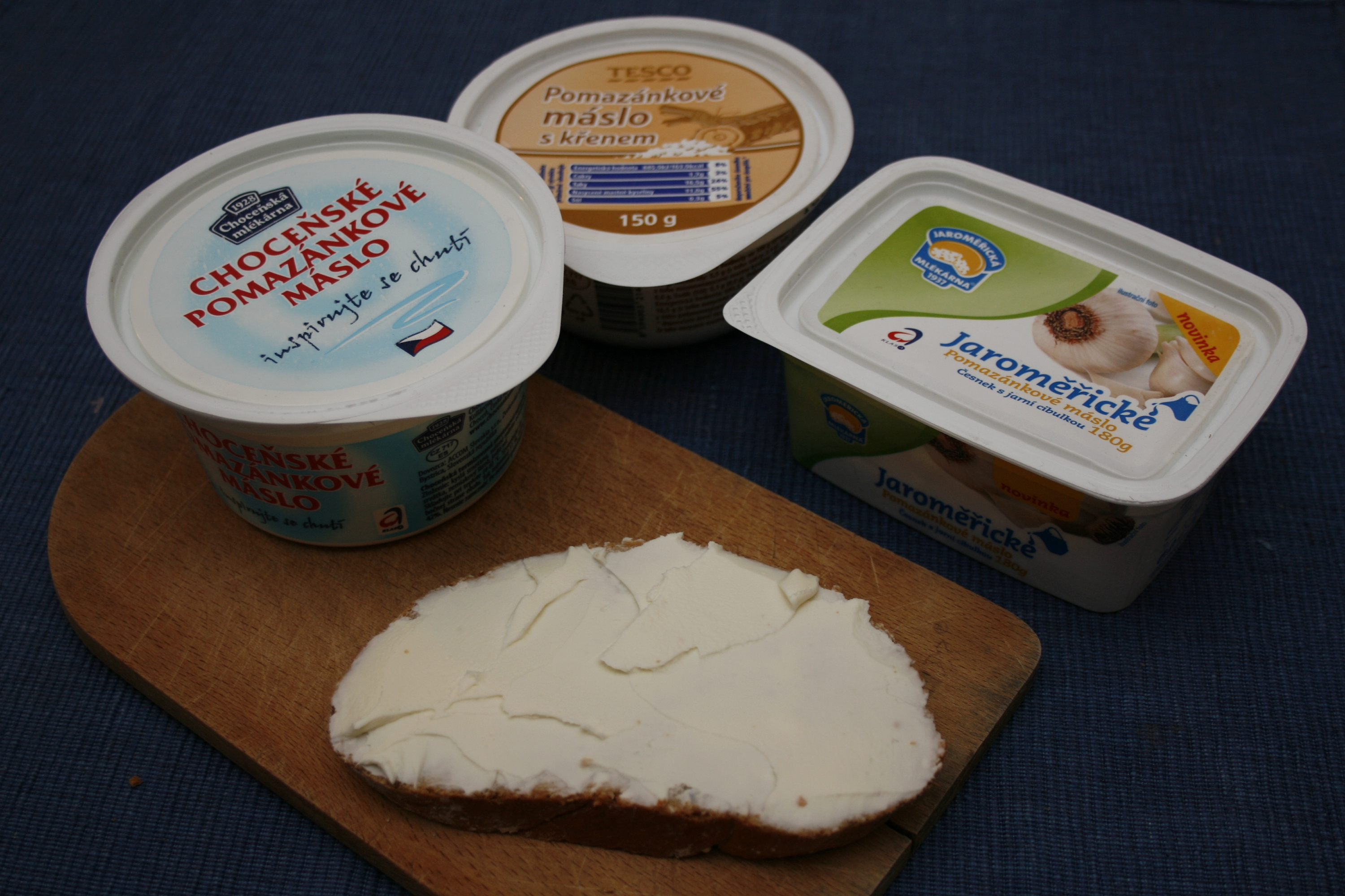 Pomazánkové máslo